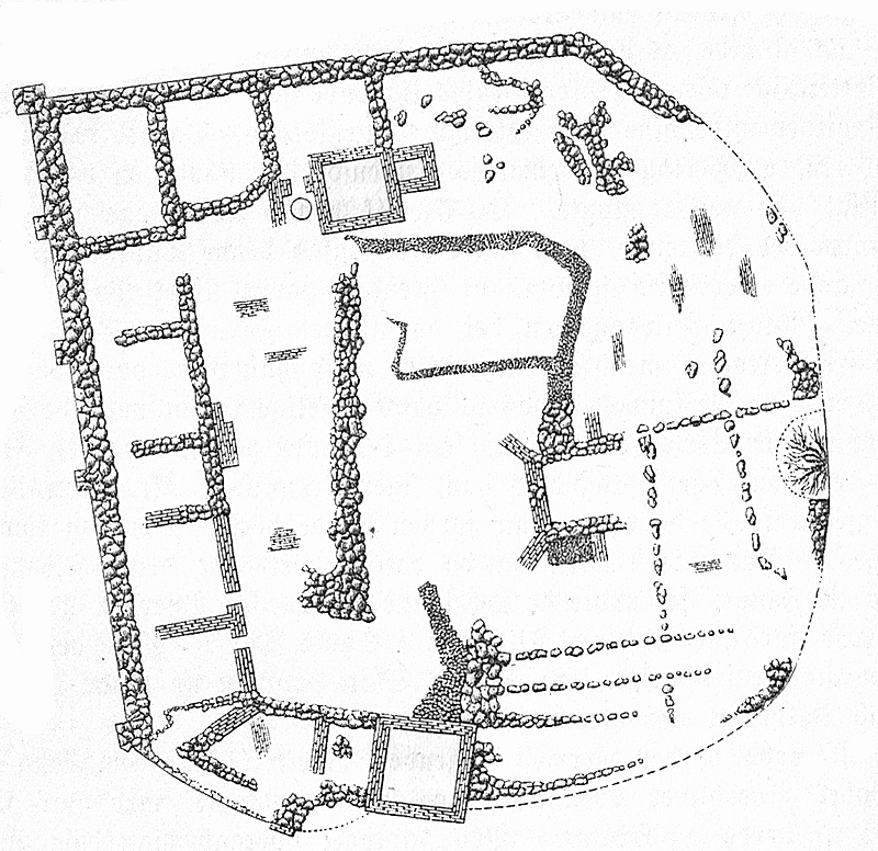 Grundplan af ruiner af Søborg Slot.